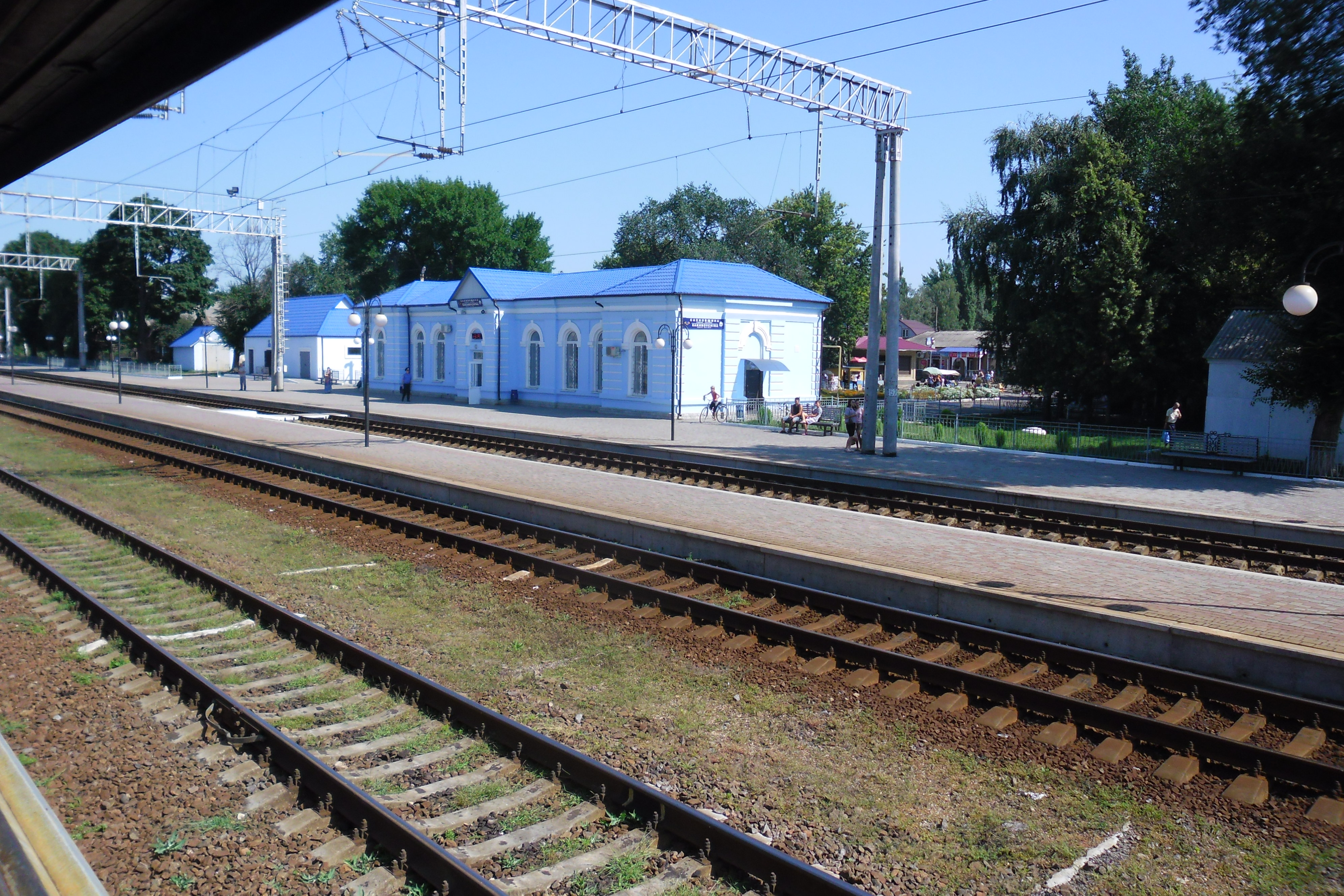 Фото